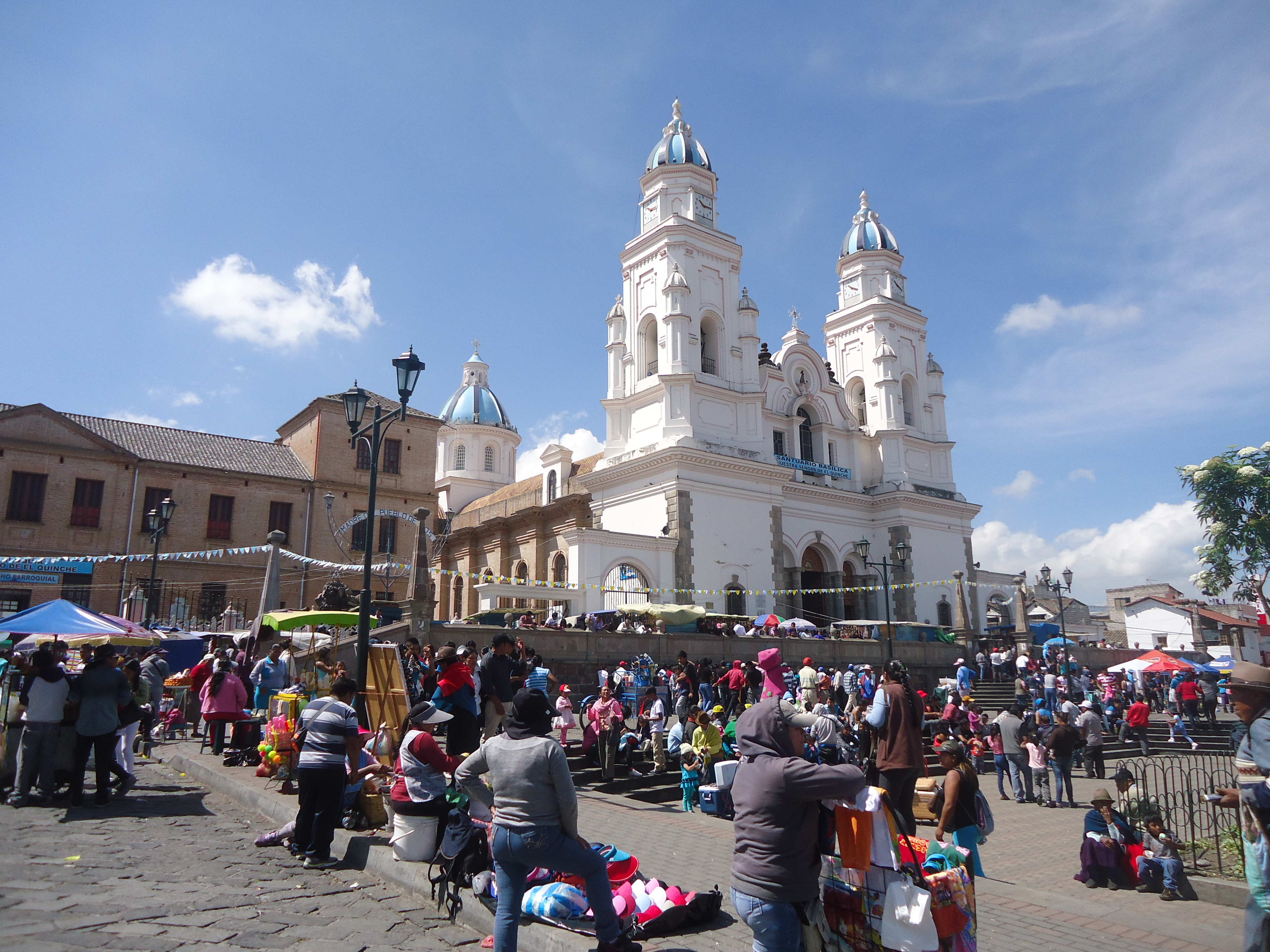 Santuario Nacional de Nuestra Señora de la Presentación de El Quinche, Quito